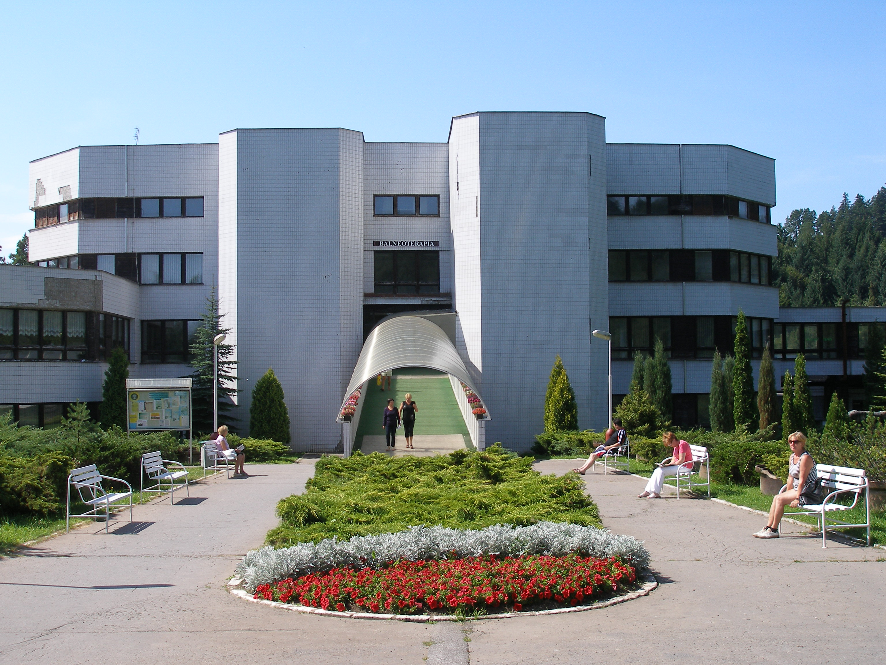 Kúpele Vyšné Ružbachy. Okres Stará Ľubovňa.